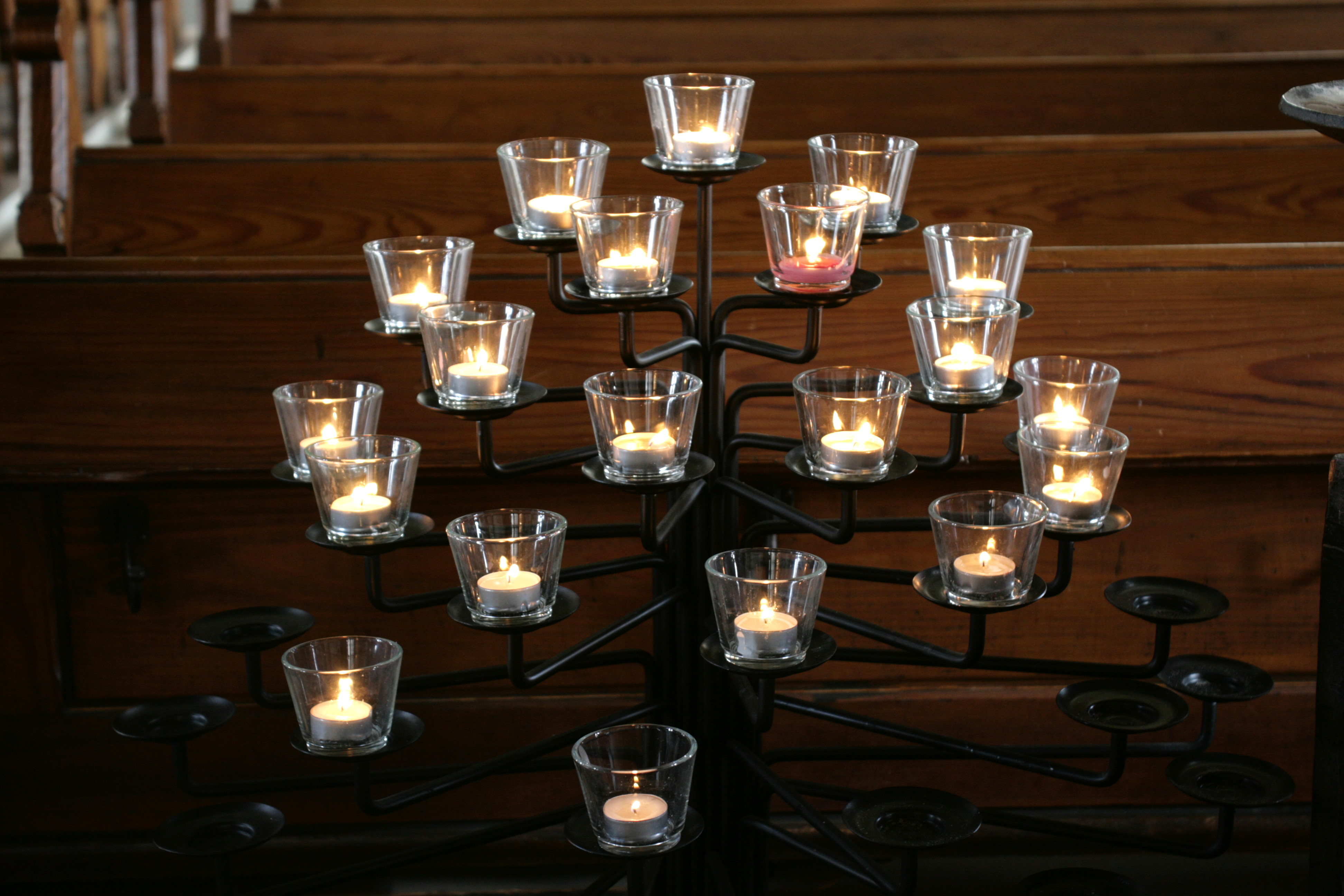 Evangelische Kirche, Steinhügel in Witten-Heven